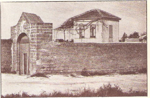 עמדת "המצודה" על כביש הביטחון